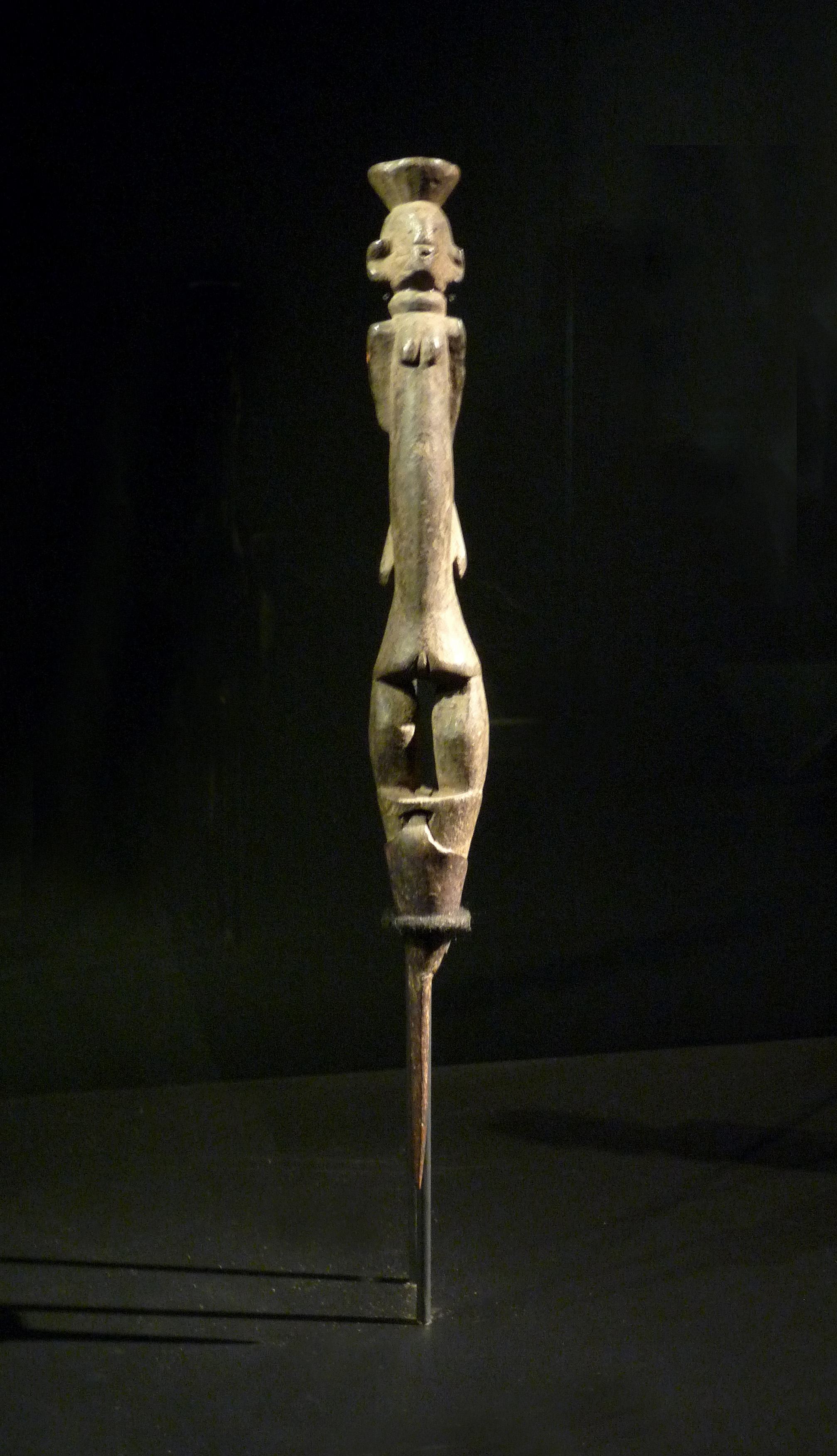 Chamba : statue-colonne féminine. Première moitié du XXe s. Bois, métal. Staatliche Museen in Berlin. Exposition Nigeria. Arts de la vallée de la Bénoué au musée du quai Branly (Paris)